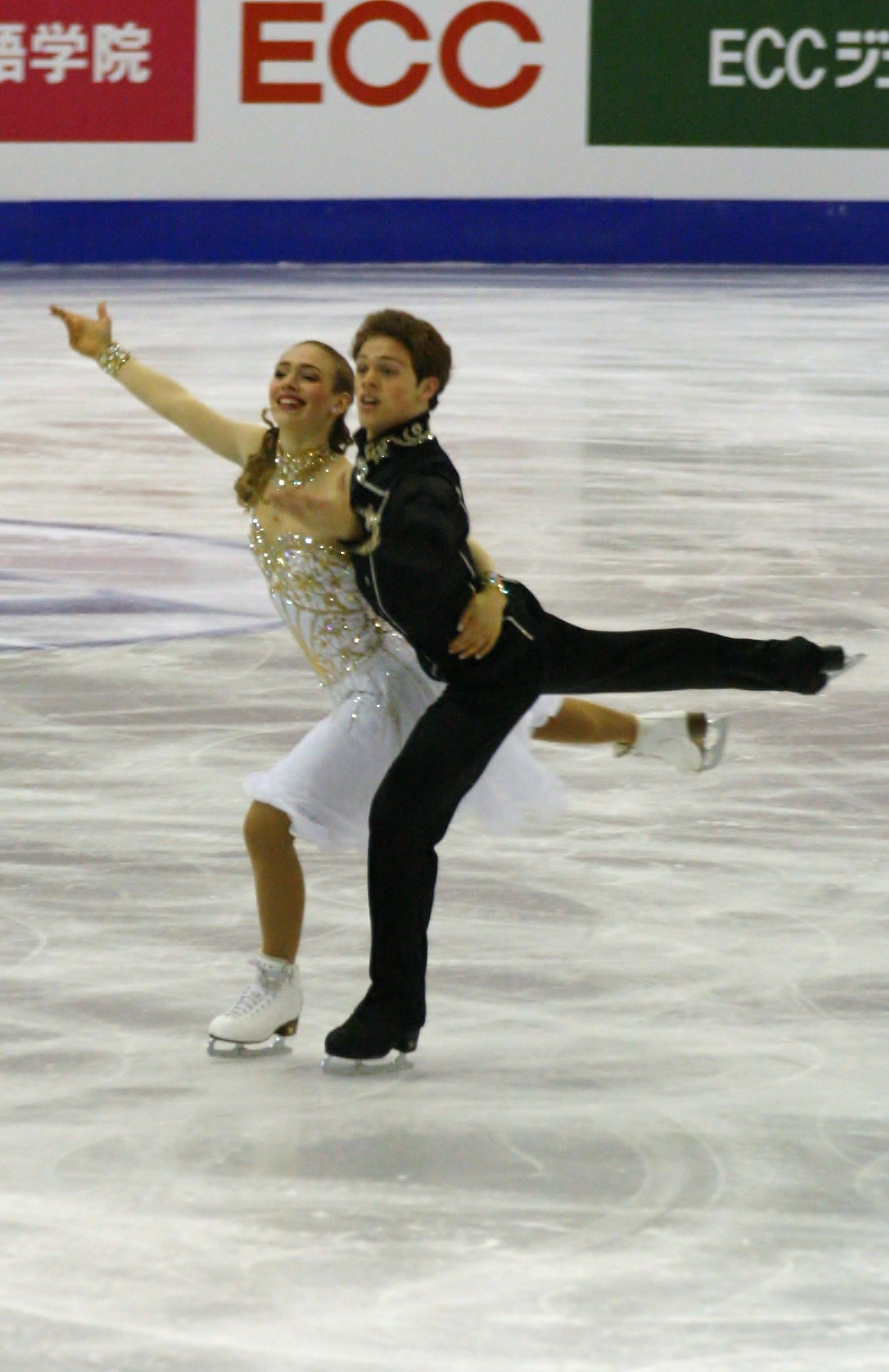 Рэйчер Парсонс и Майкл Парсонс (США) на финале Гран-при по фигурному катанию среди юниоров 2015-2016.